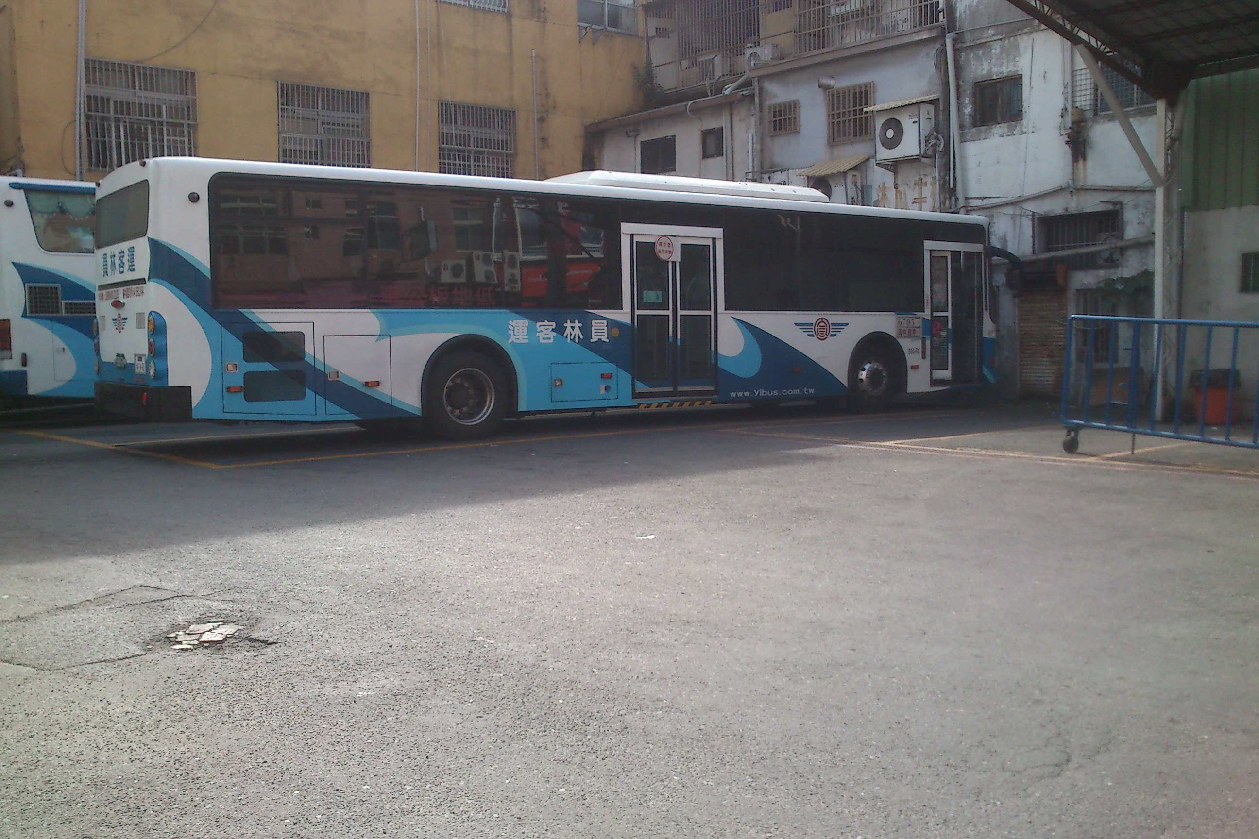 中文（台灣）: 2013年員林客運成運汽車低底盤公車